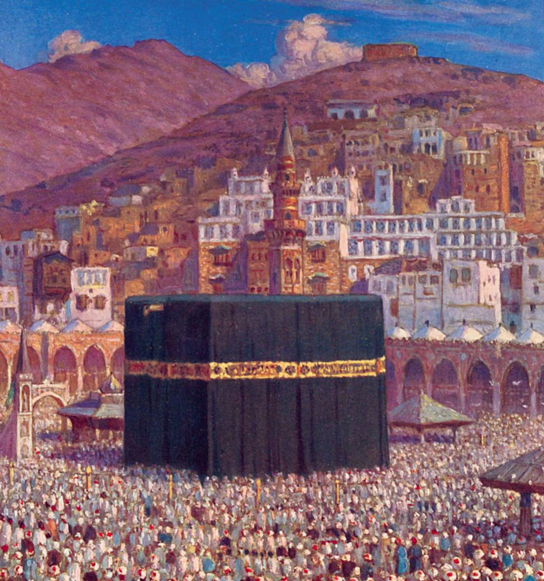 La Prière autour du temple sacré de la Kaâba à Mekka. Description tirée de Denise Brahimi et Koudir Benchikou, La Vie et l'Œuvre d'Étienne Dinet, Courbevoie, ACR, coll. « Les Orientalistes » (n° 2), 1984 et 1991, 304 p. (ISBN 2-86770-006-X), p. 259, notice n° 427 du catalogue raisonné : Huile traitée à l'œuf sur carton 25,5 x 23,5 cm, signée en haut à gauche, destinée à l'illustration de la p. 1 du livre La Vie de Mohammed. Ancienne collection Frédéric Lung. Expositions : 1914, Paris, Société Nationale des Beaux-Arts. 1918, Paris, Palais Galliéra. Foire du Livre.